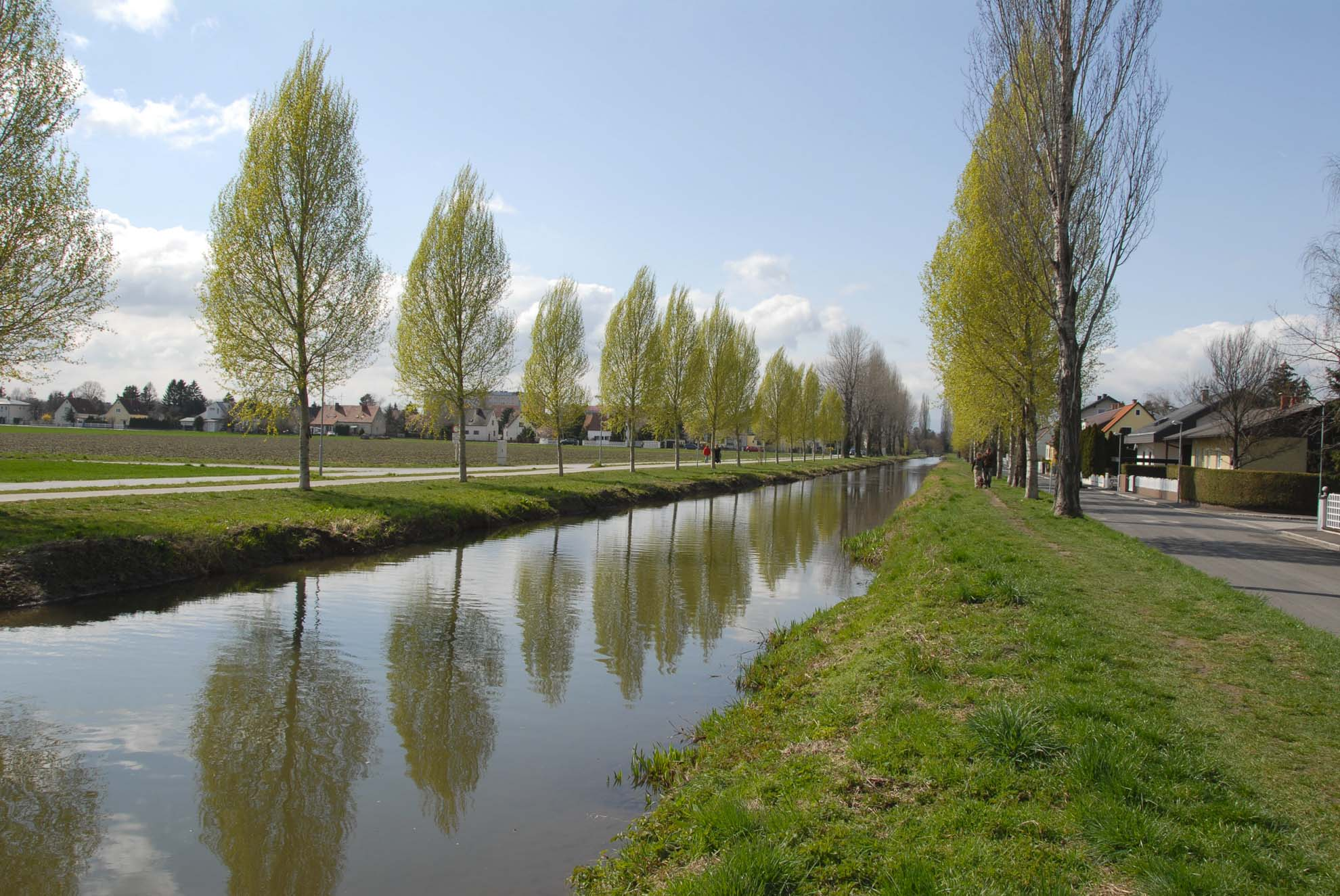 Der Wiener Neustädter Kanal am Nordostrand von Wiener Neustadt beim "Triangel" (der ehemals Y-förmigen Verzweigung des Kanals in den Pöttschinger Ast (zugeschüttet) und den Wiener Ast. Hier das Kanalstück zum Kehrbach. Aufnahme : Motox 25.03.07